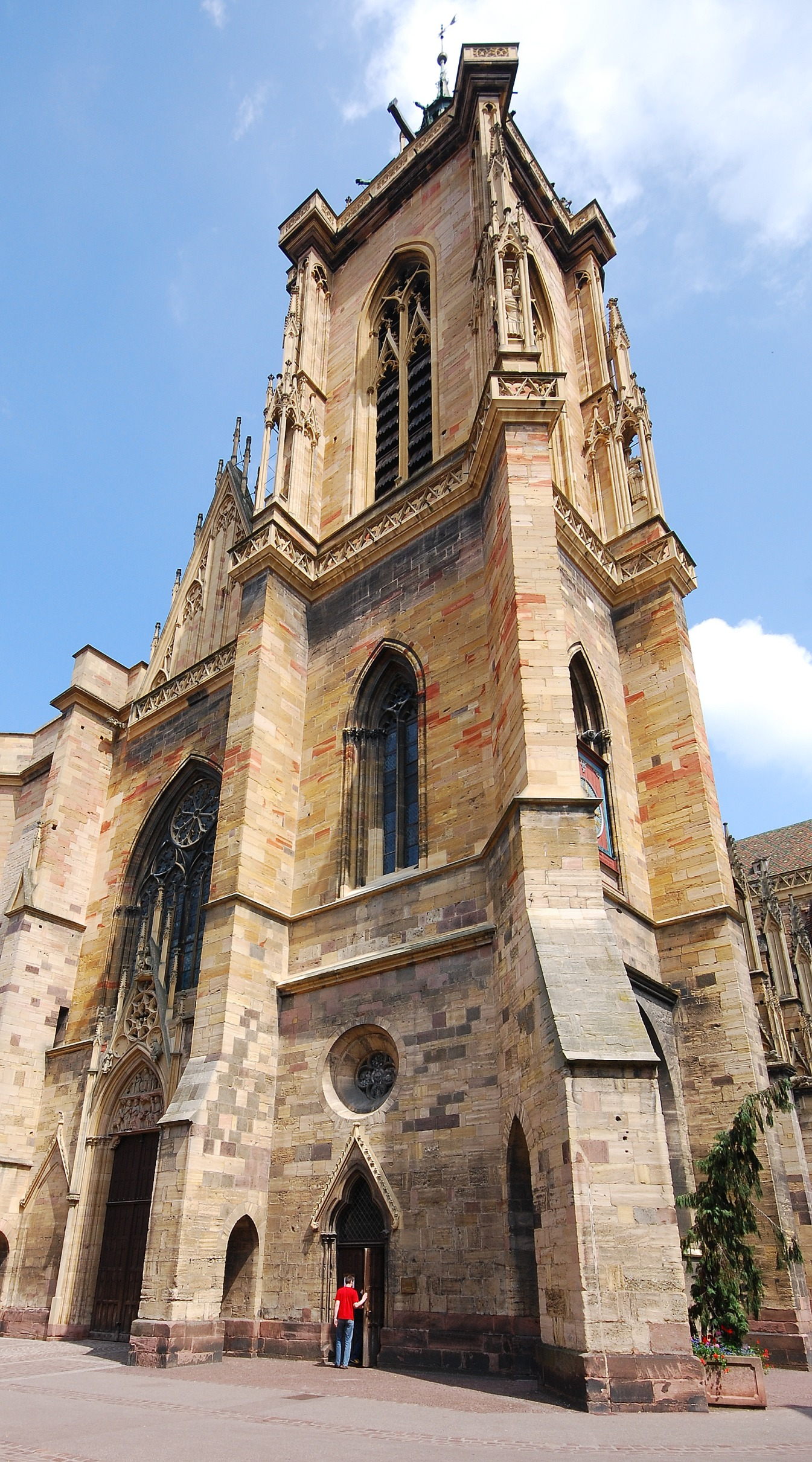 Turm des Martinsmünsters Colmar